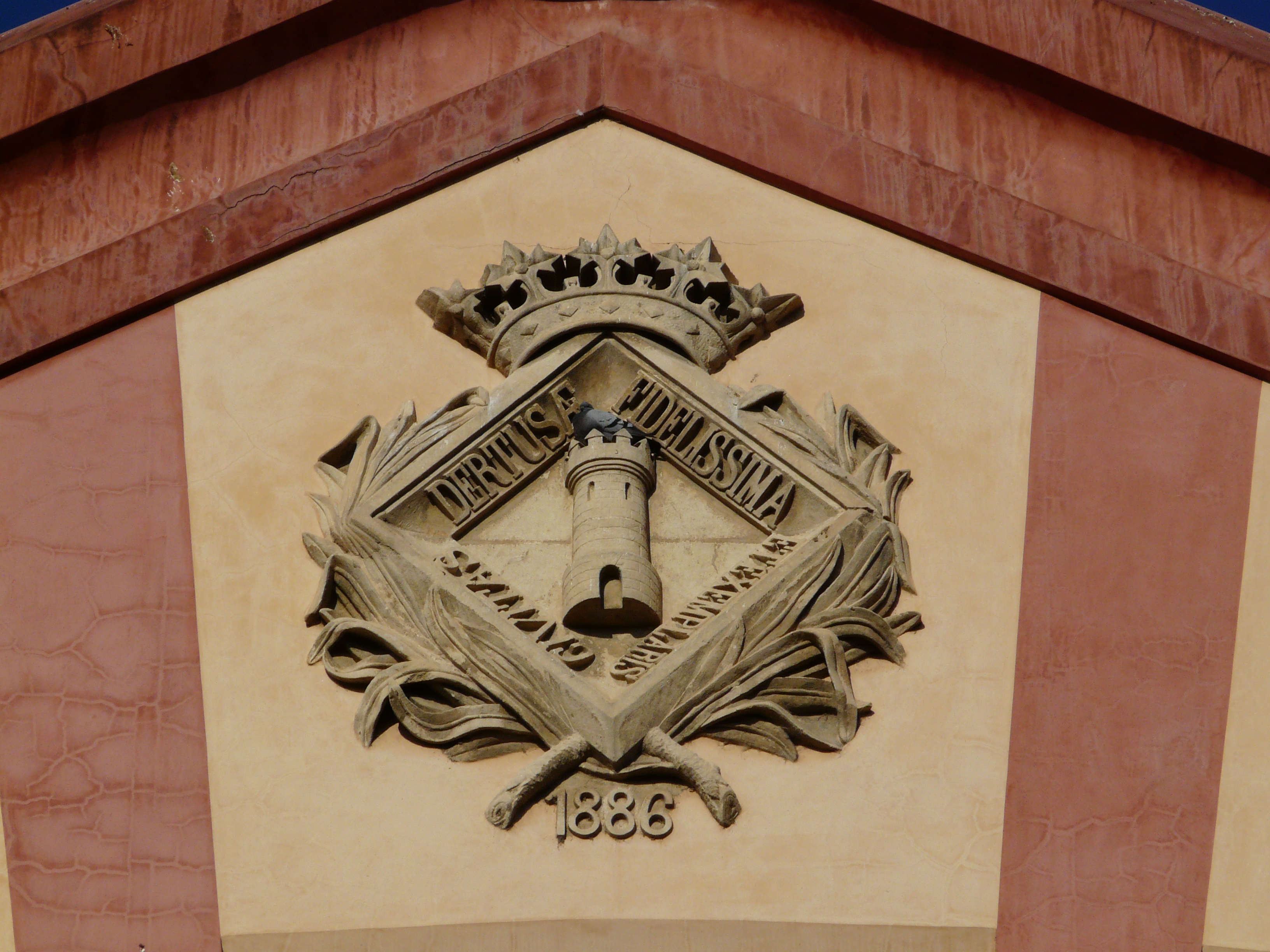 Mercat Municipal (Tortosa) Object location40° 48′ 39.95″ N, 0° 31′ 11.54″ E